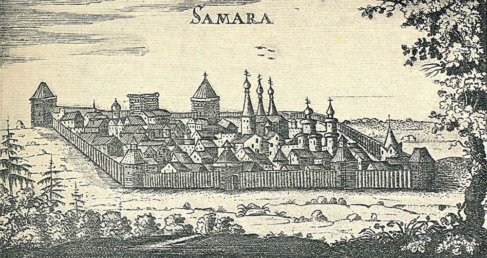 Самара